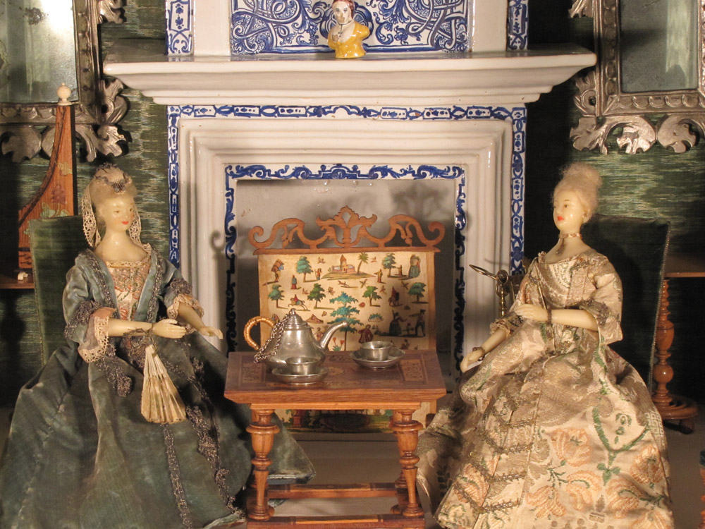 Arnstadt, Szene aus der barocken Puppenstadt Mon plaisir im Neuen Palais